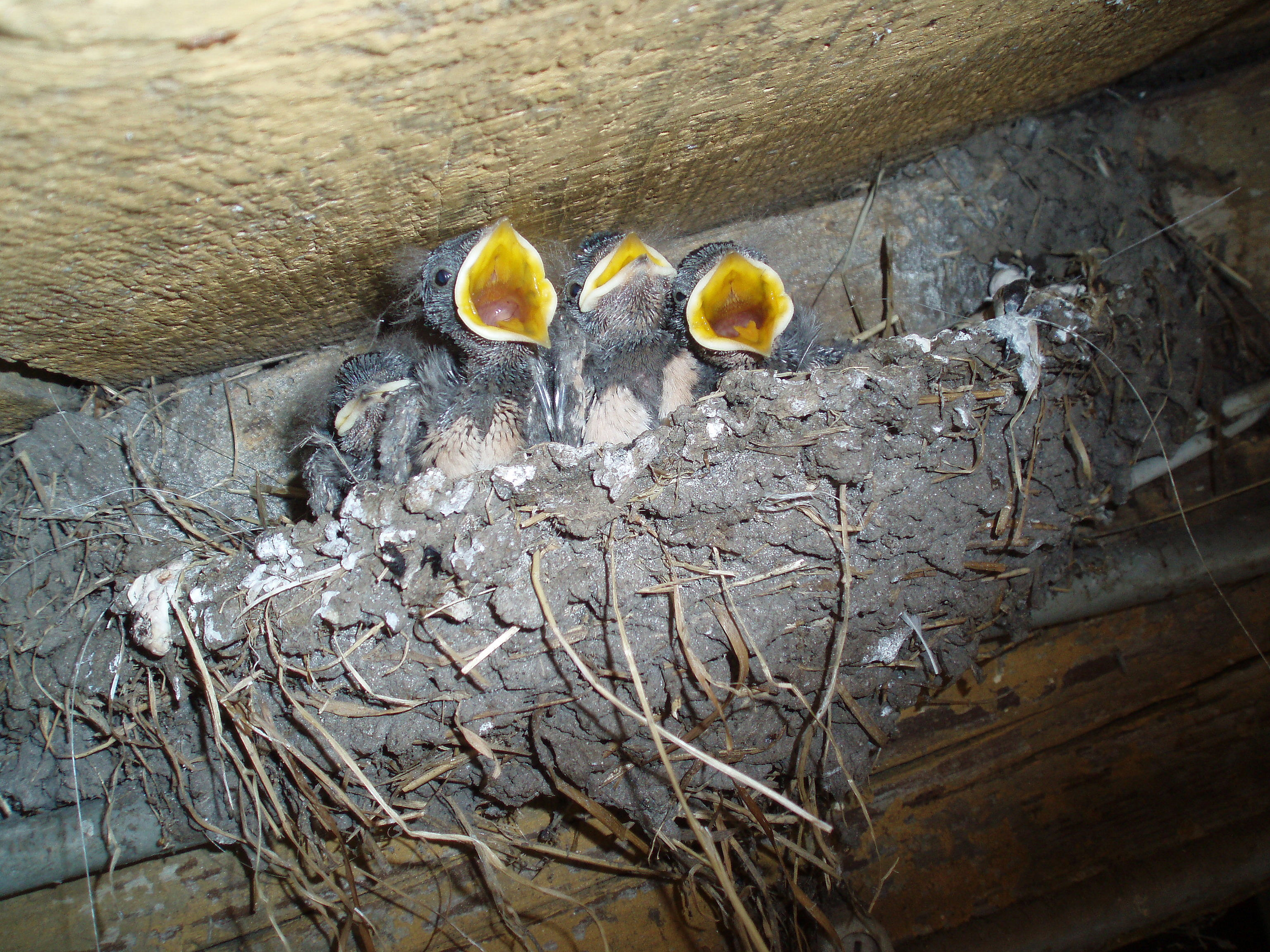 Een nest jonge huiszwaluwen op de deel van boerderij Ojerslust in Willeskop.